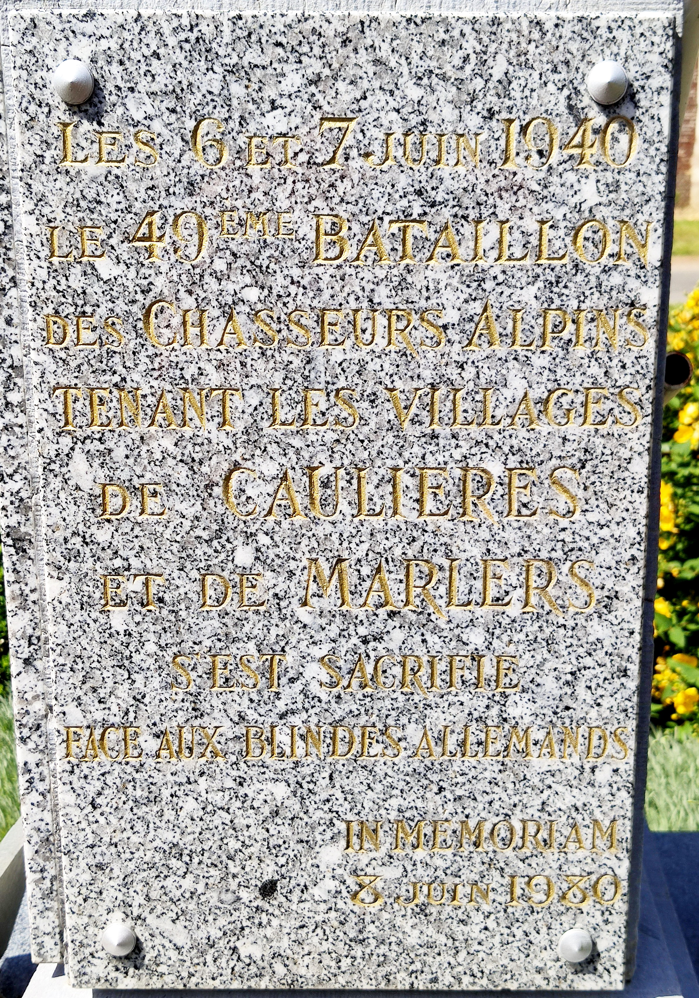 Caulières : Plaque latérale du monument aux morts